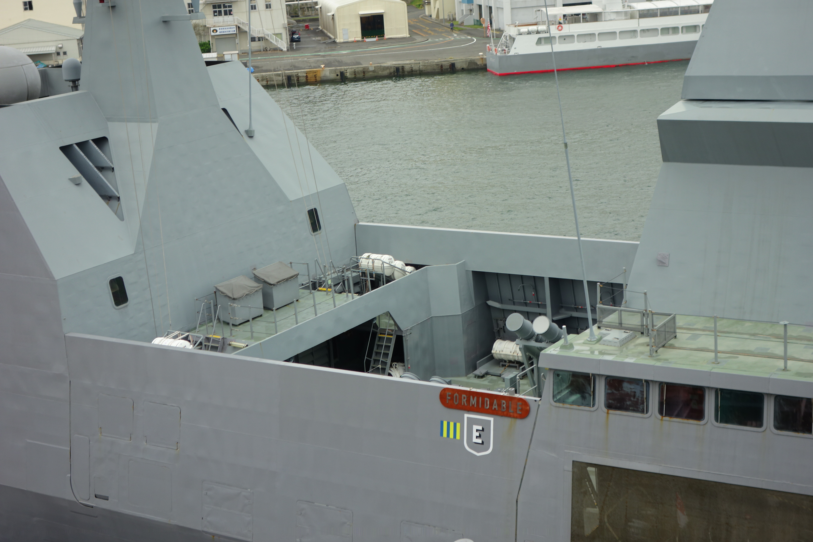 艦中央部の写真。ハープーン発射台も遮蔽された状態で配置される。